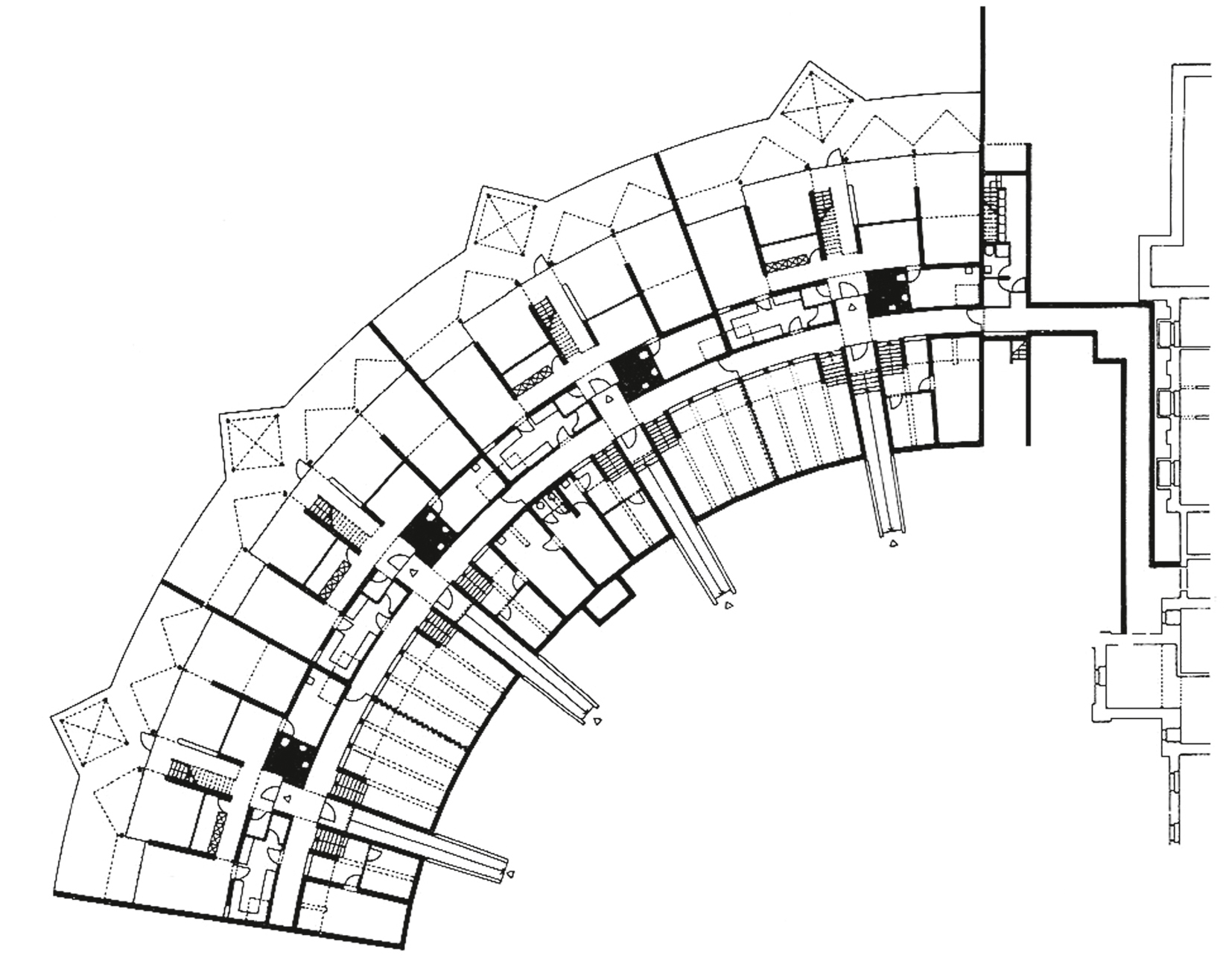 Grundriss